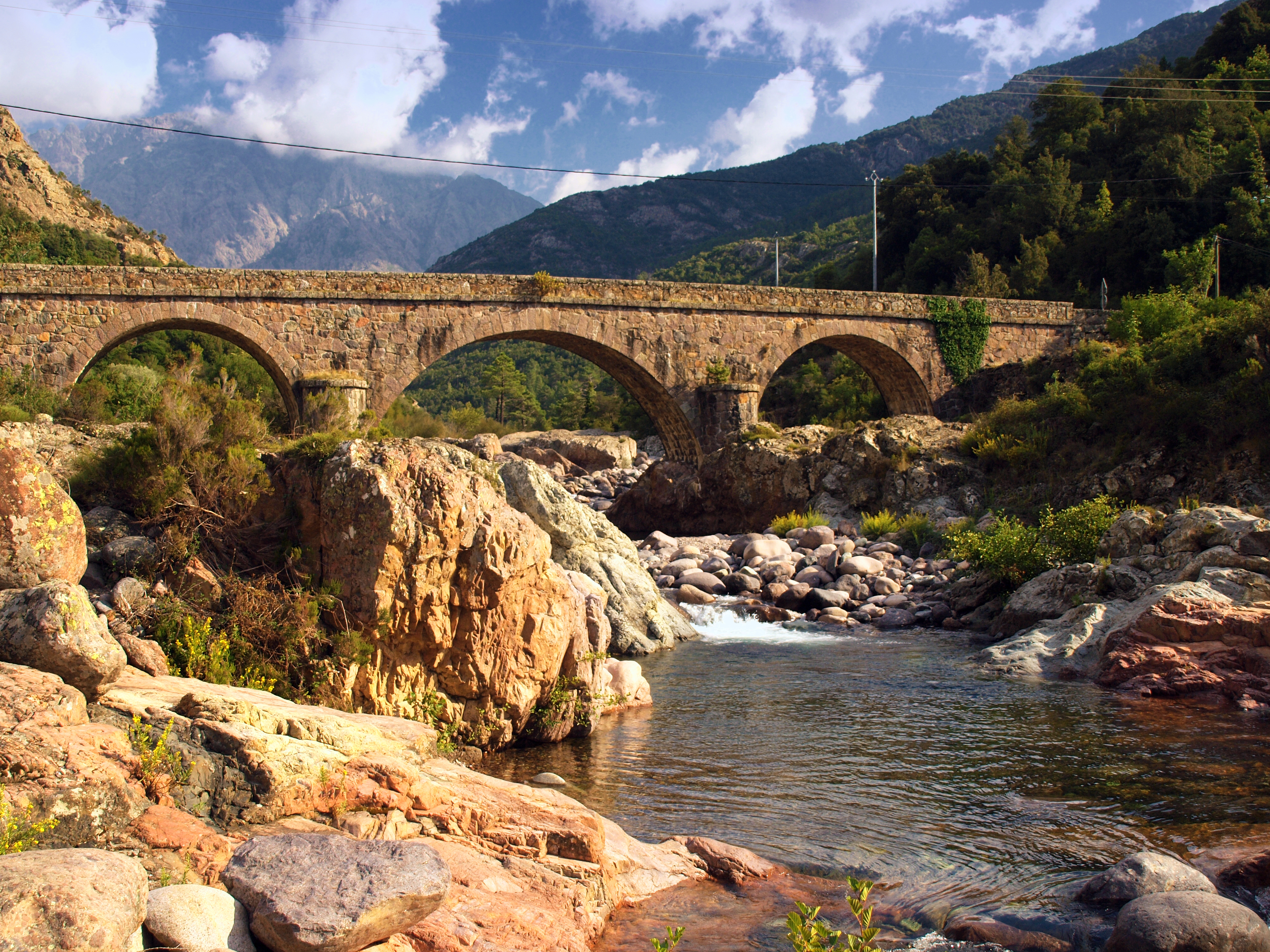 Manso (Haute-Corse)- Le pont de Manso dans la vallée du Fango.